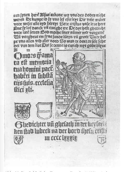 Totentanz: Excipit der Lübecker Inkunabel des Hans van Ghetelen (1489); mit Druckermarken Folio 36, recto